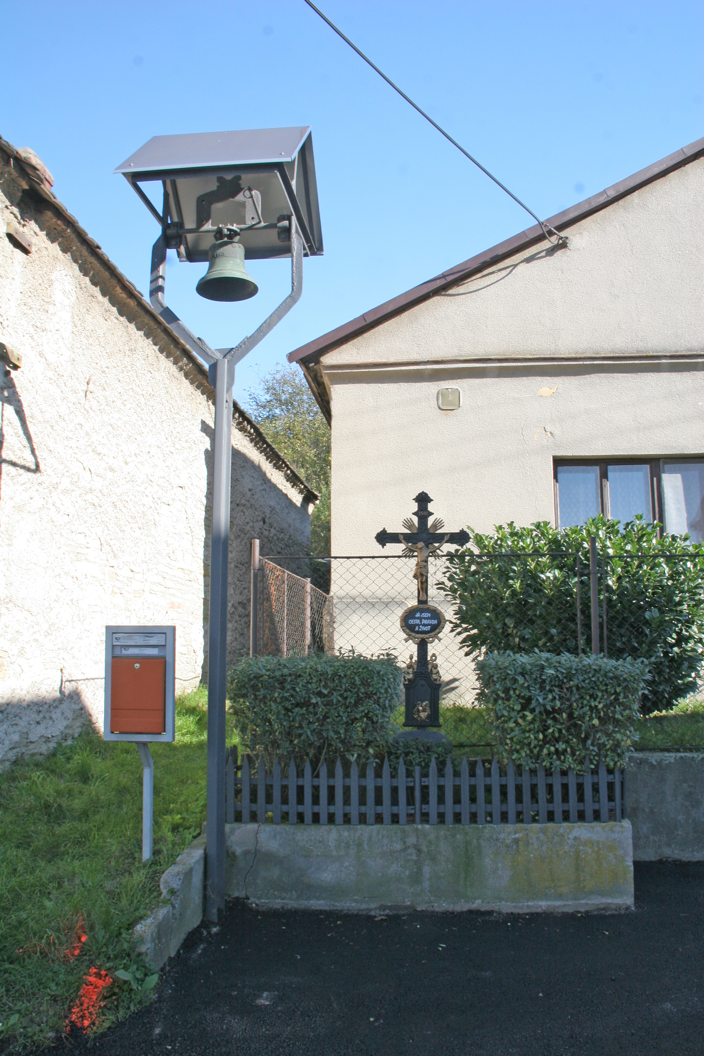 Vinice zvonička a křížek